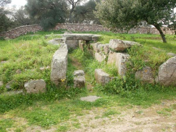 Tomba dei giganti di Moru - Arzachena